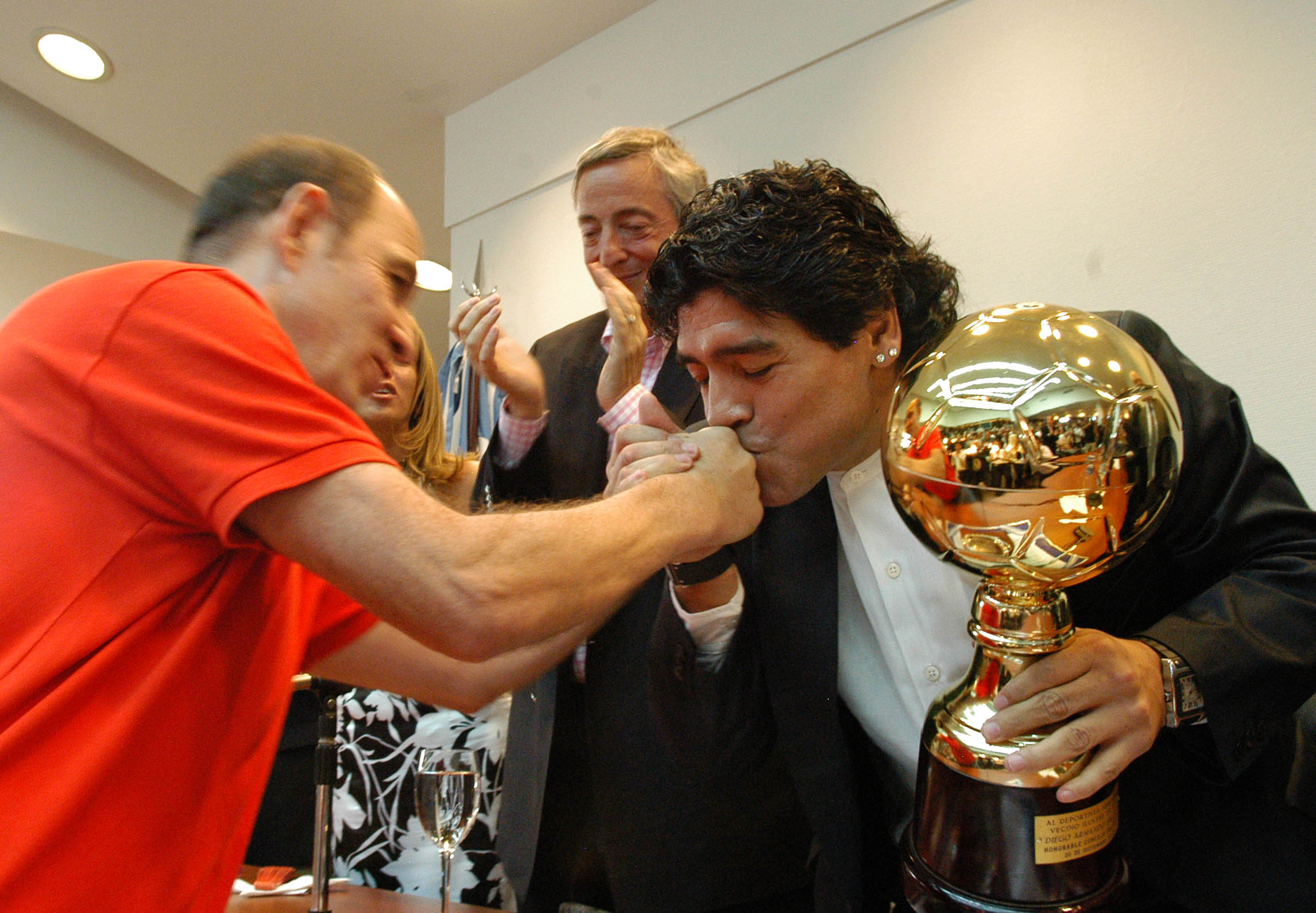 Diego Armando Maradona junto a Ricardo Bochini